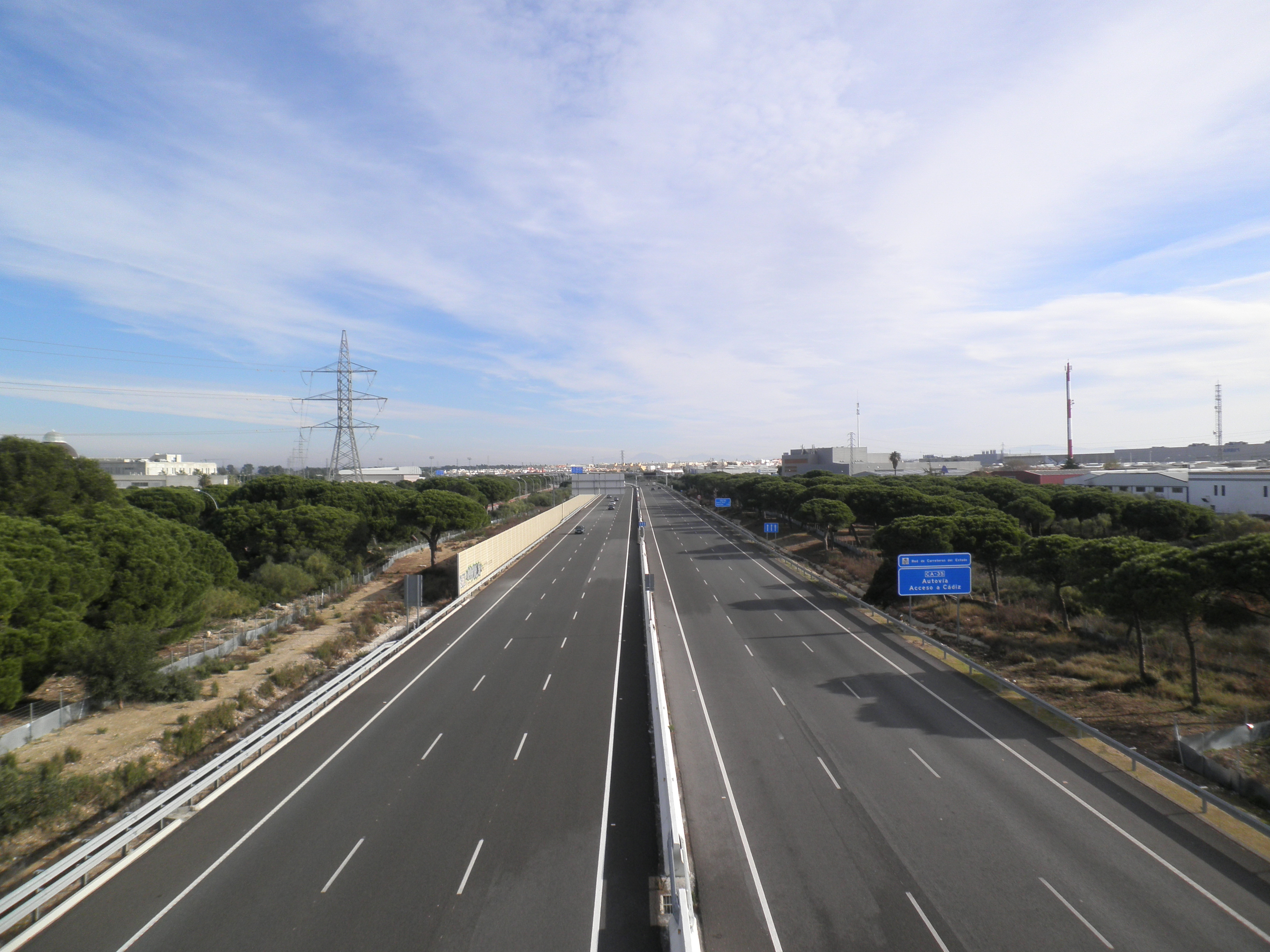 Vista de la Autovía CA-35 por el Río San Pedro